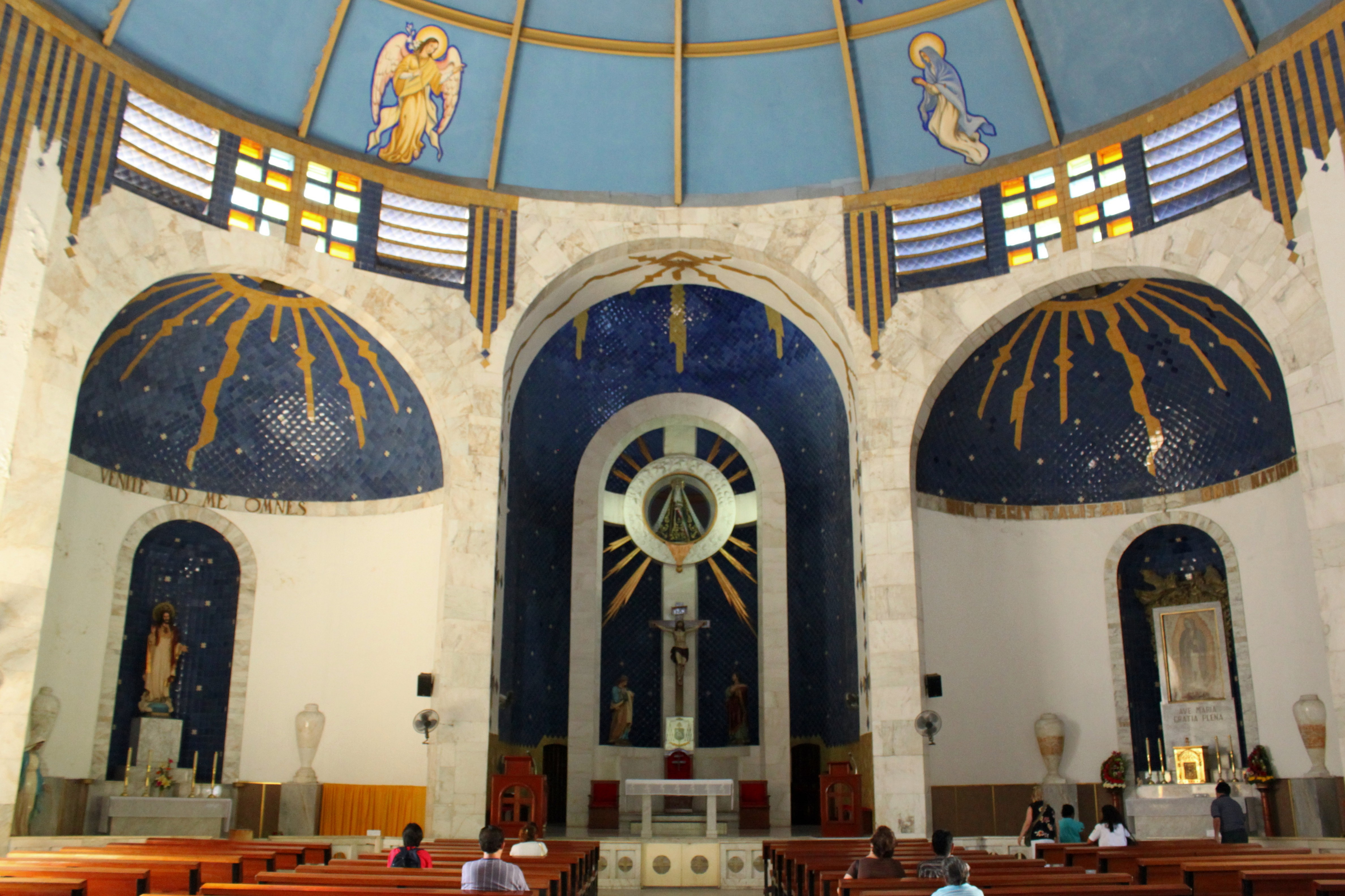 Interior de la Catedral de Nuestra Señora de la Soledad en Acapulco, Guerrero, México.